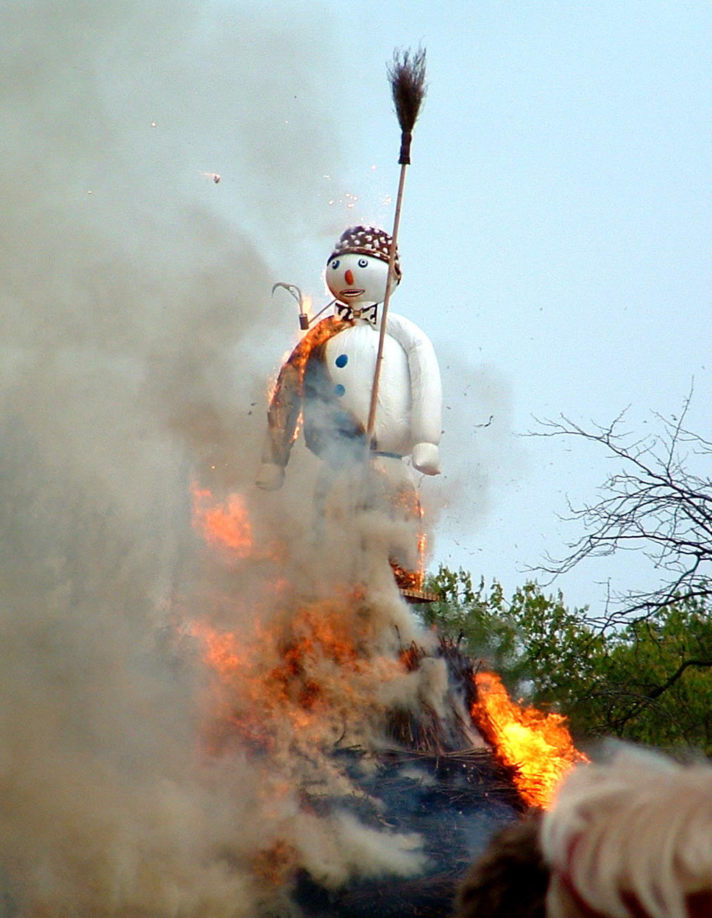 Sechseläuten 2005, Verbrennung des Böögg